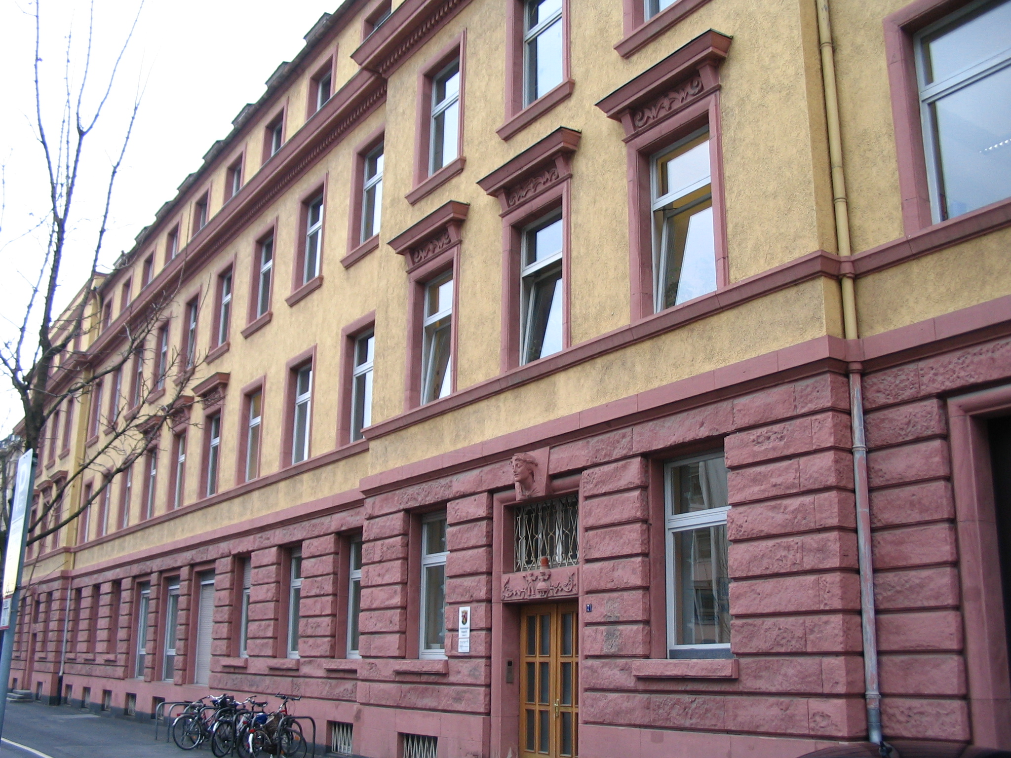 Gebäude B des Amtsgerichts Mainz in der Ernst-Ludwig-Straße 7.